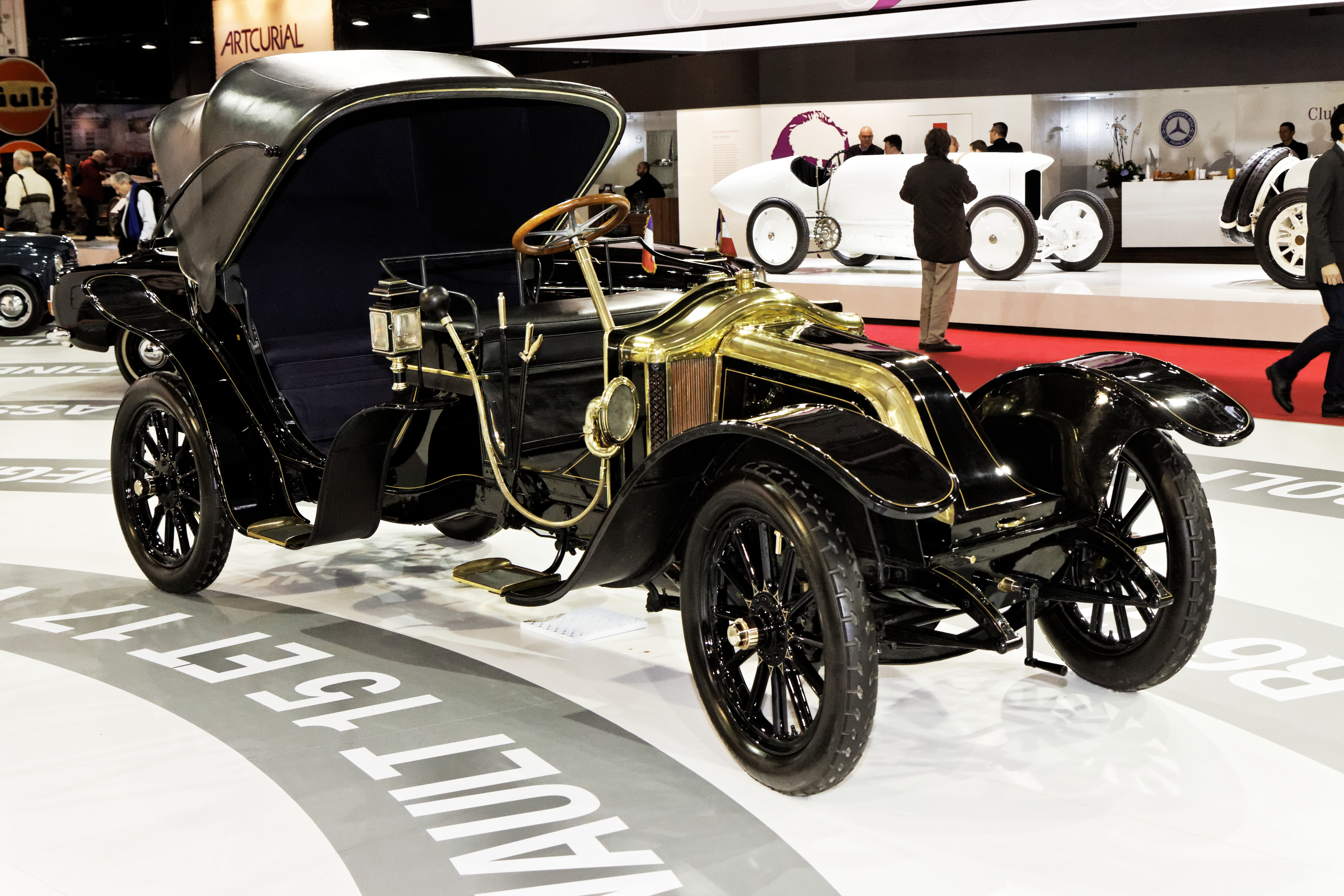 Une Renault type DG Victoria Rotschild présentée lors du salon Retromobile 2013.